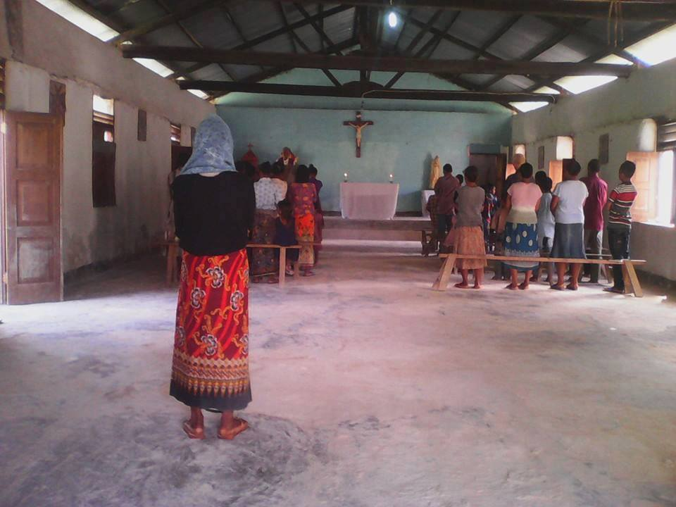 Maluro, Suco Lore I